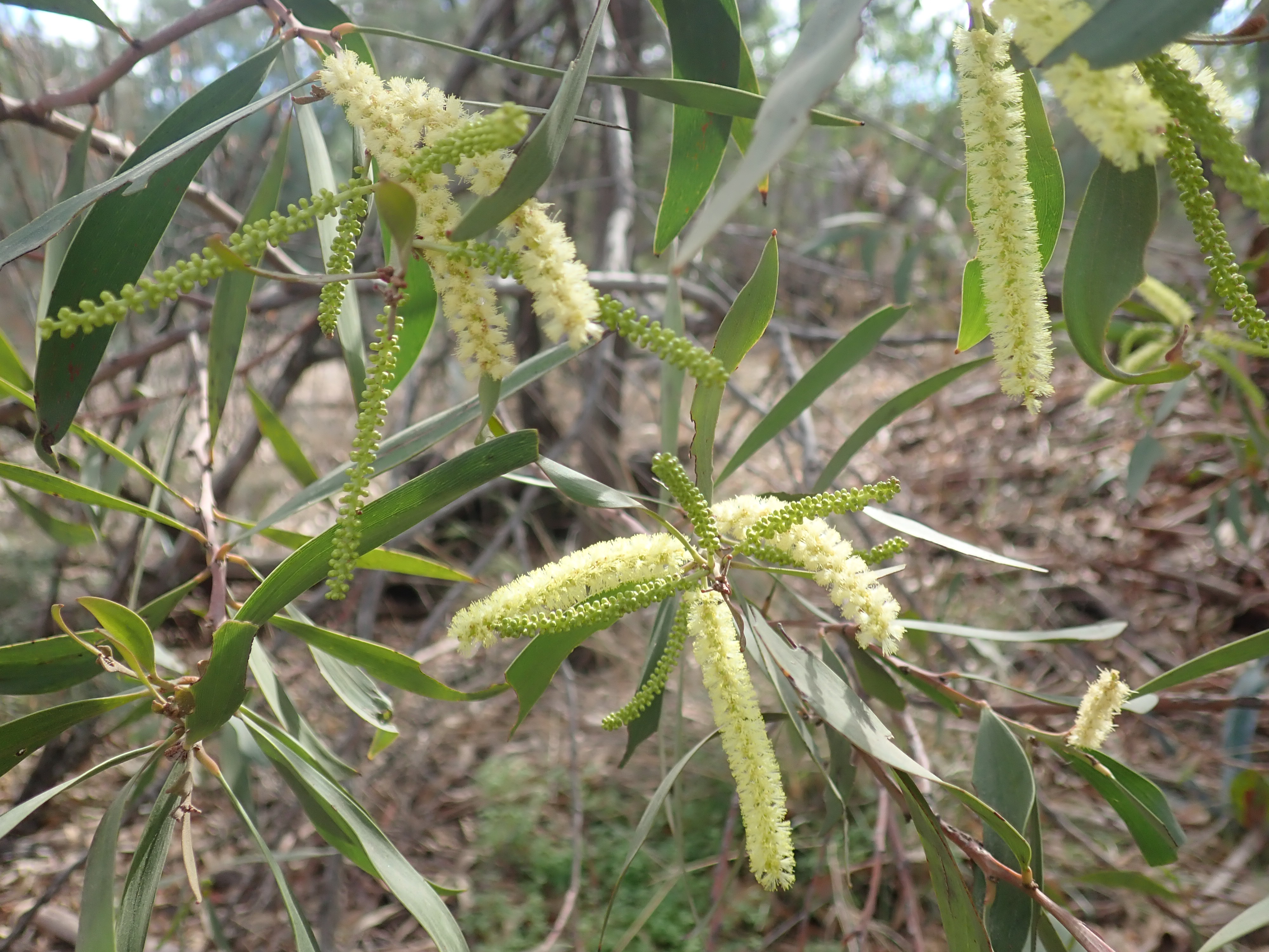 Acacia leiocalyx, Eulah Creek, Narrabri, NSW